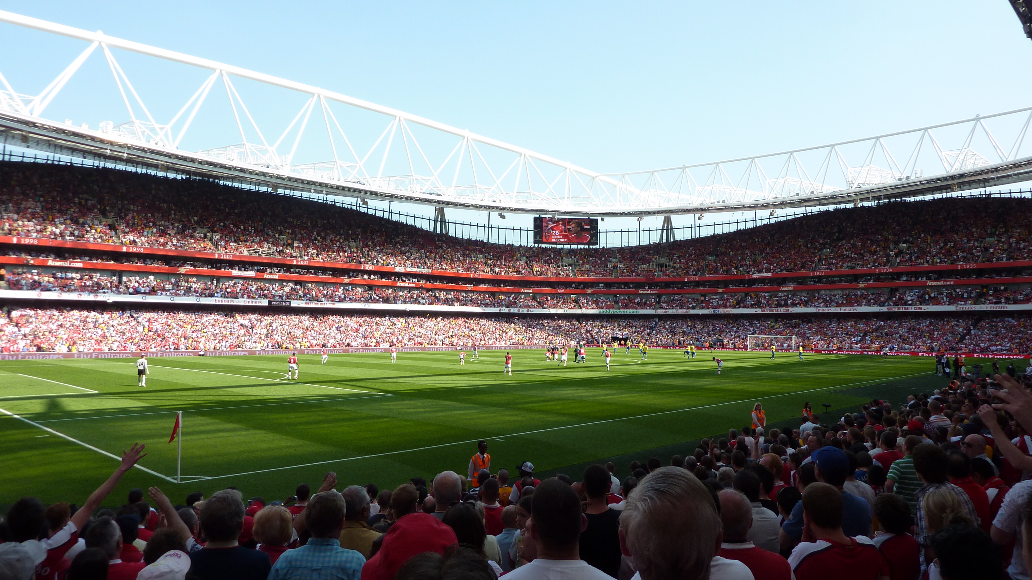 Emirates Stadium 2009 (Arsenal vs Stoke)